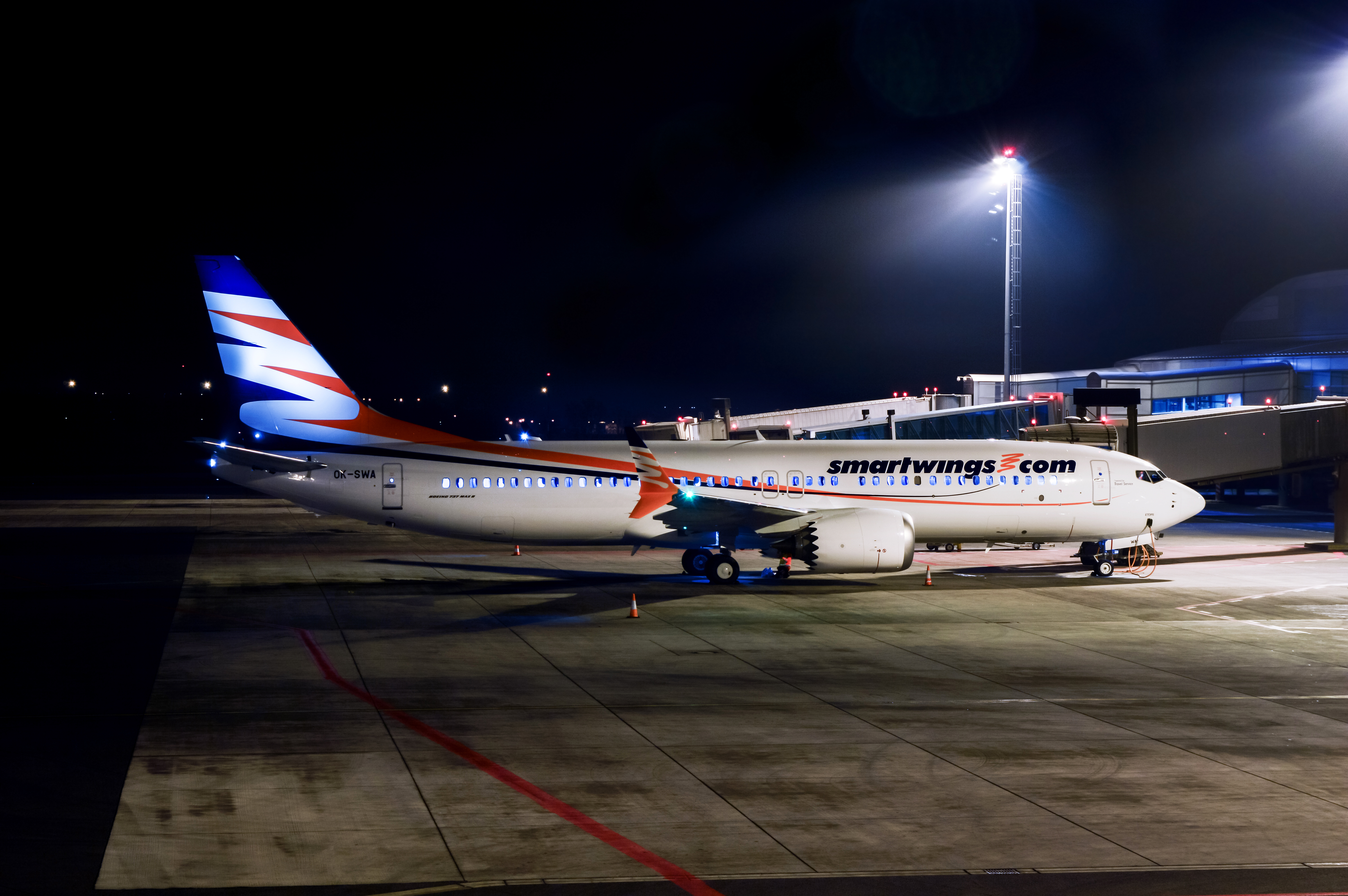 OK-SWA at Prague Václav Havel Airport